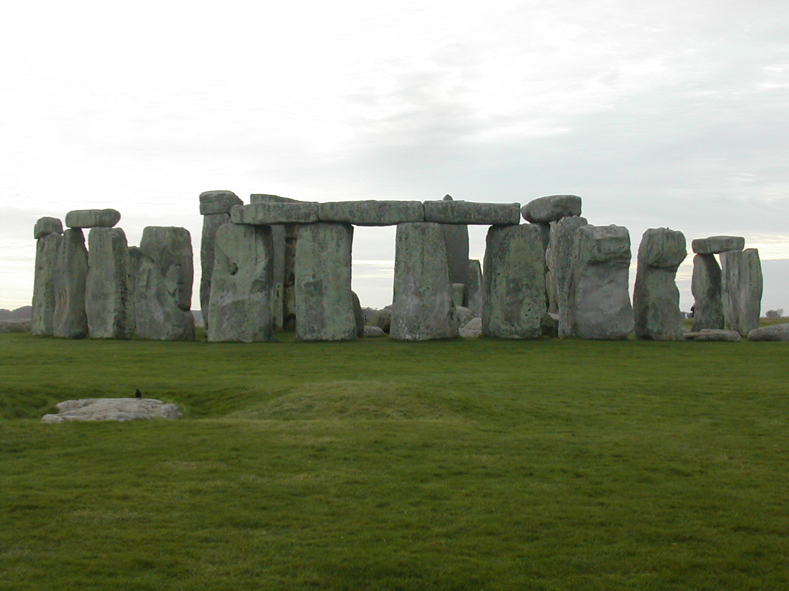 Stonehenge closeup.